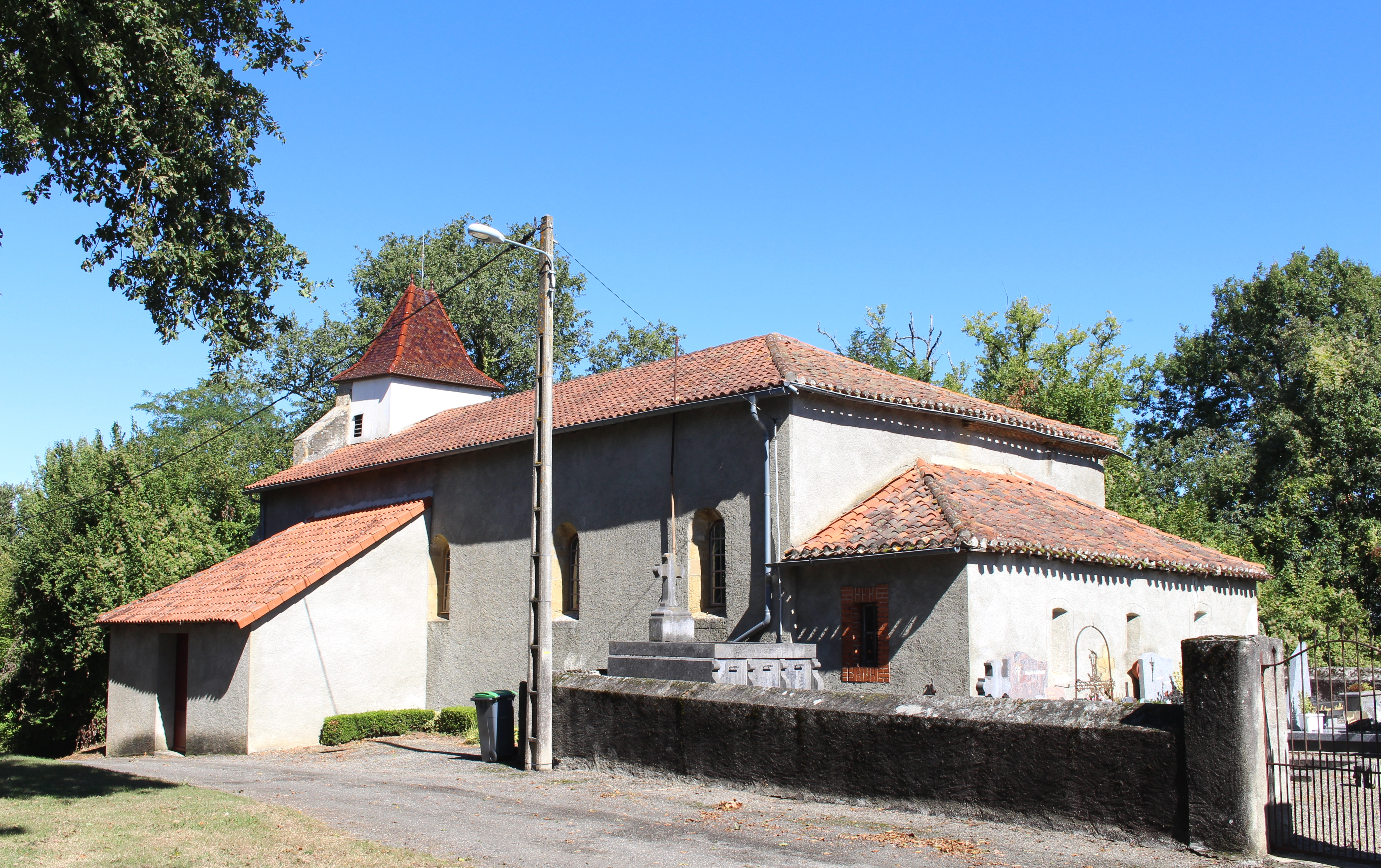 Église Saint-Orens de Barbachen (Hautes-Pyrénées)